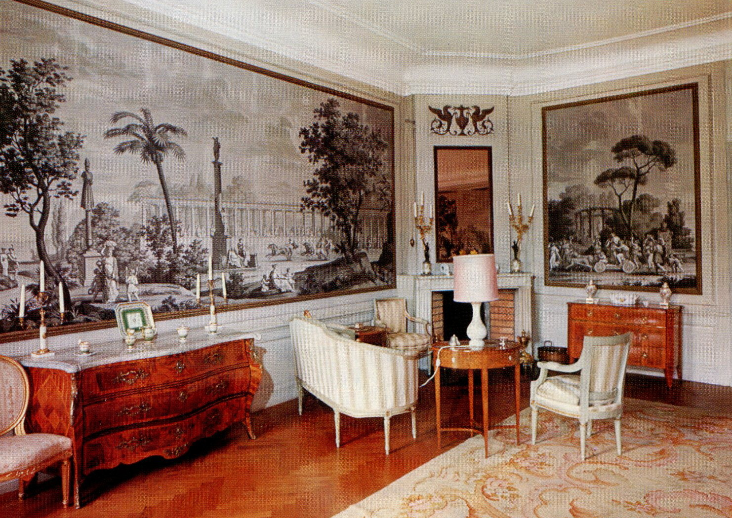 Hagbybergas herrgård Stora salongen